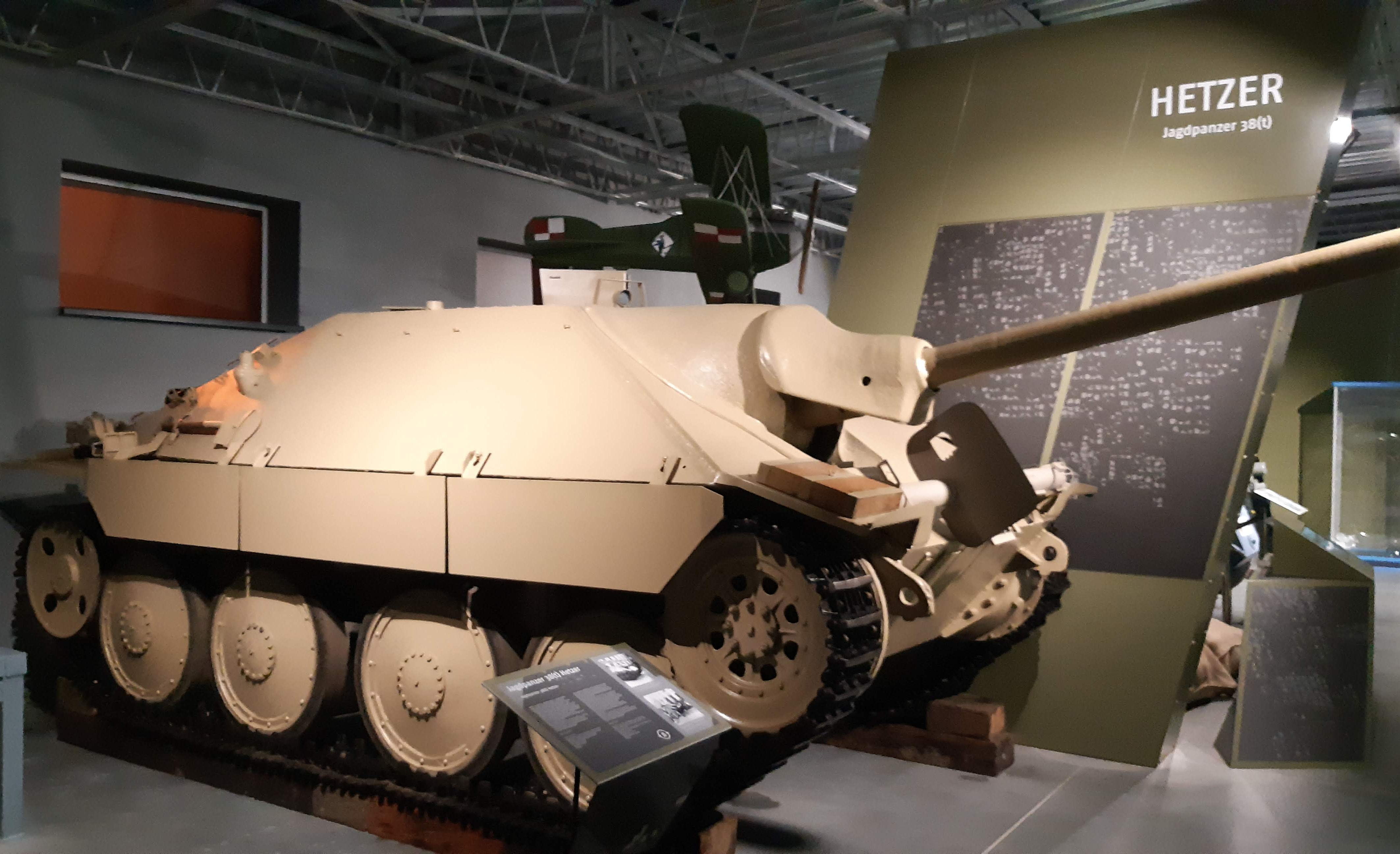 Jagdpanzer 38(t), znany jako Hetzer, w Muzeum Broni Pancernej w Poznaniu (w nowej siedzibie otwartej w 2019).